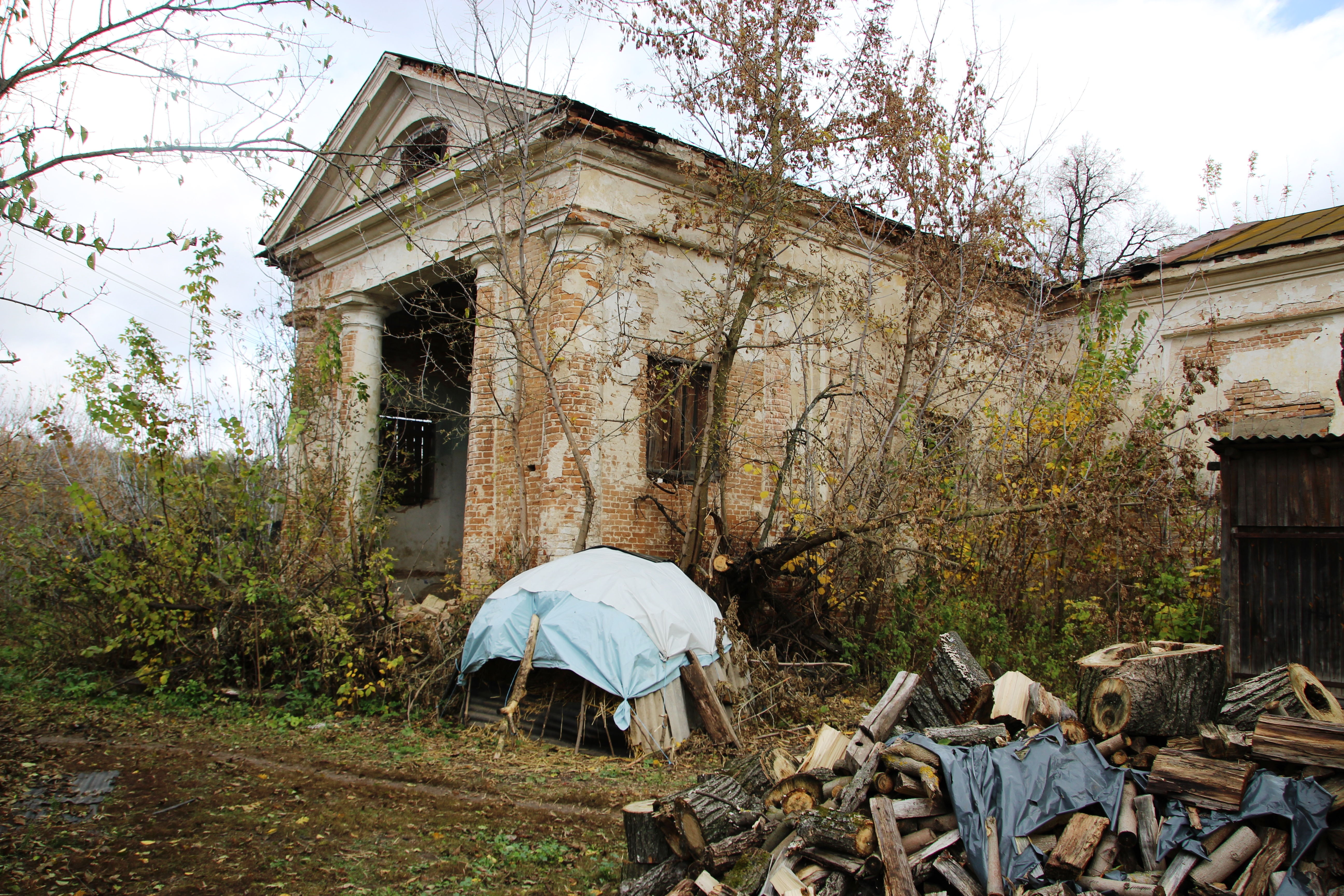 Троїцька церква, село Василівка, вул. Петровського, 19